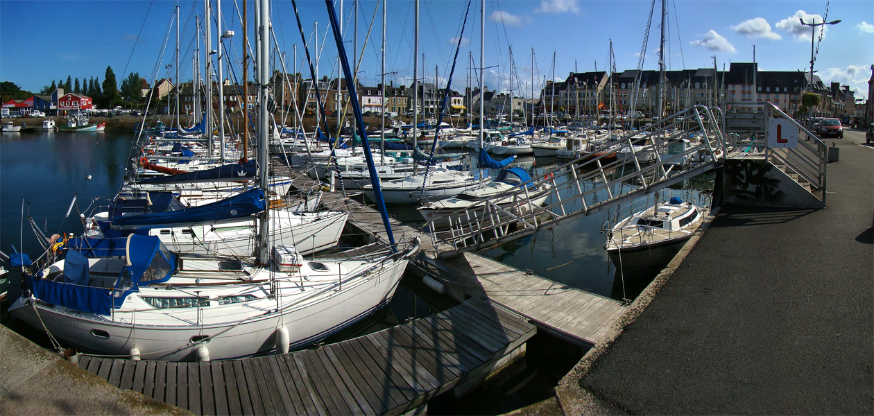 Paimpol, Côtes-d’Armor, Bretagne, France.